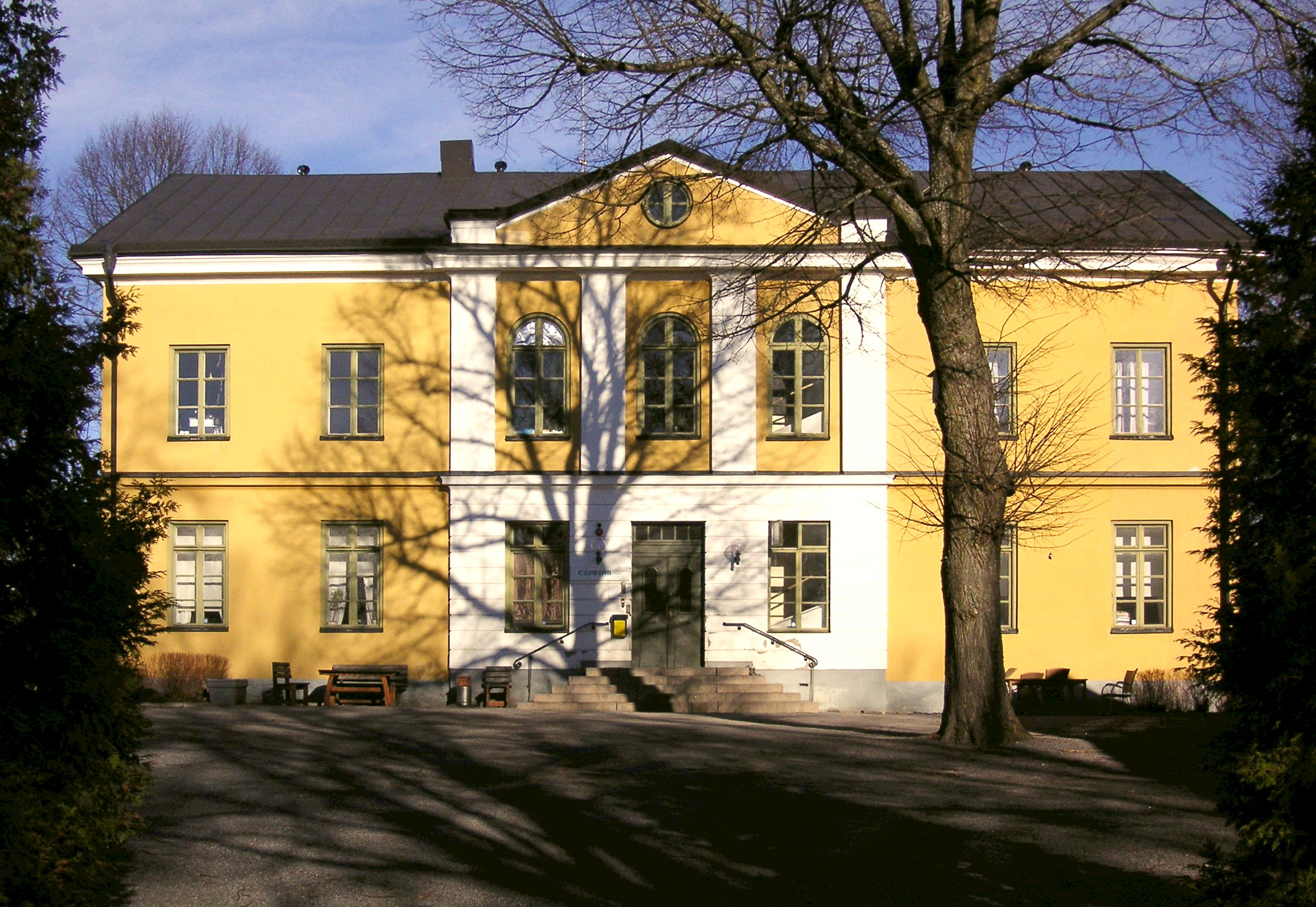 Skarpnäcks herrgård i Stockholm